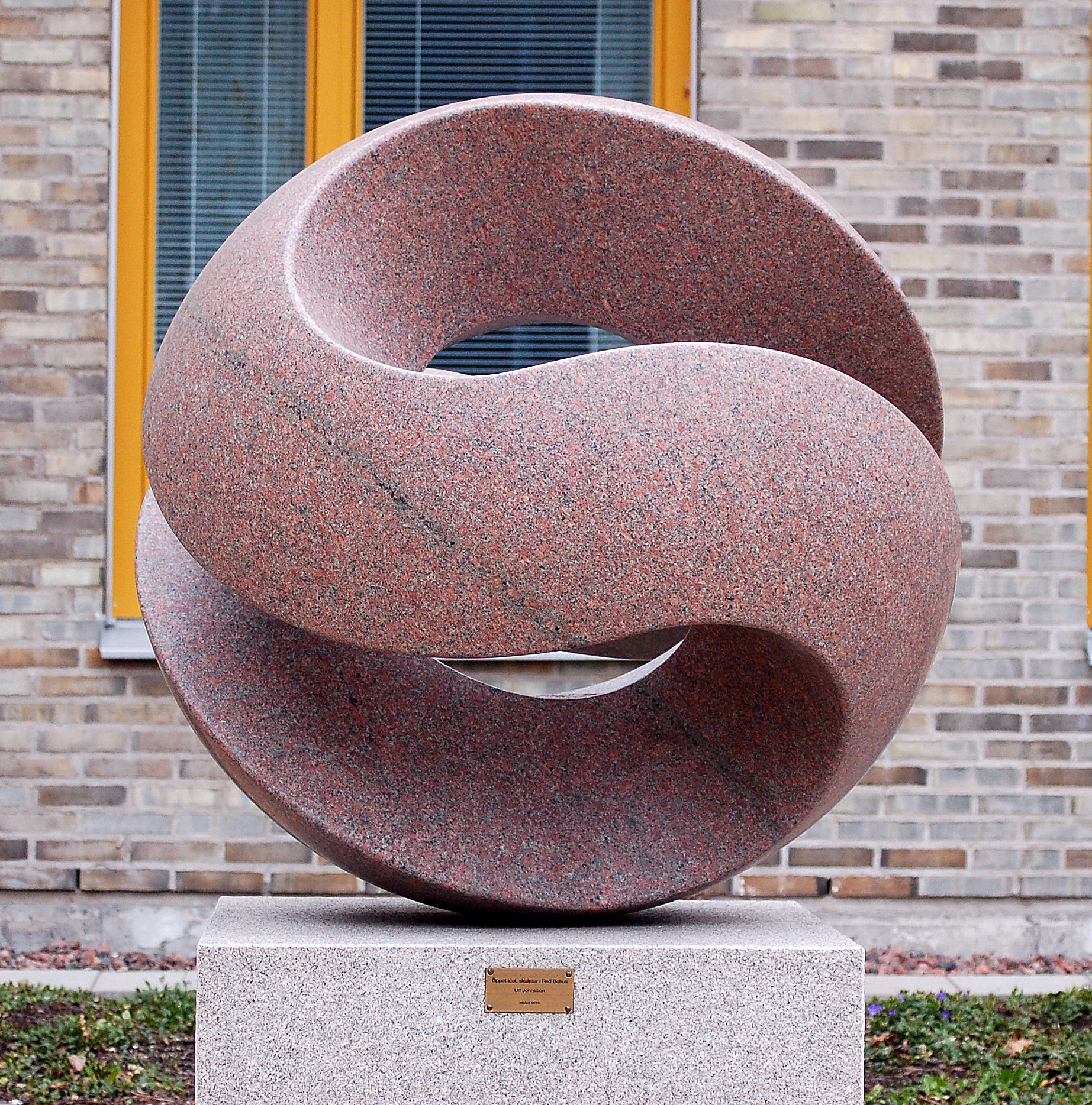 Skulpturen "Öppet klot" i röd bohusgranit av Ulf Johnsson placerad utanför psykiatrihusets entré i Karlstad